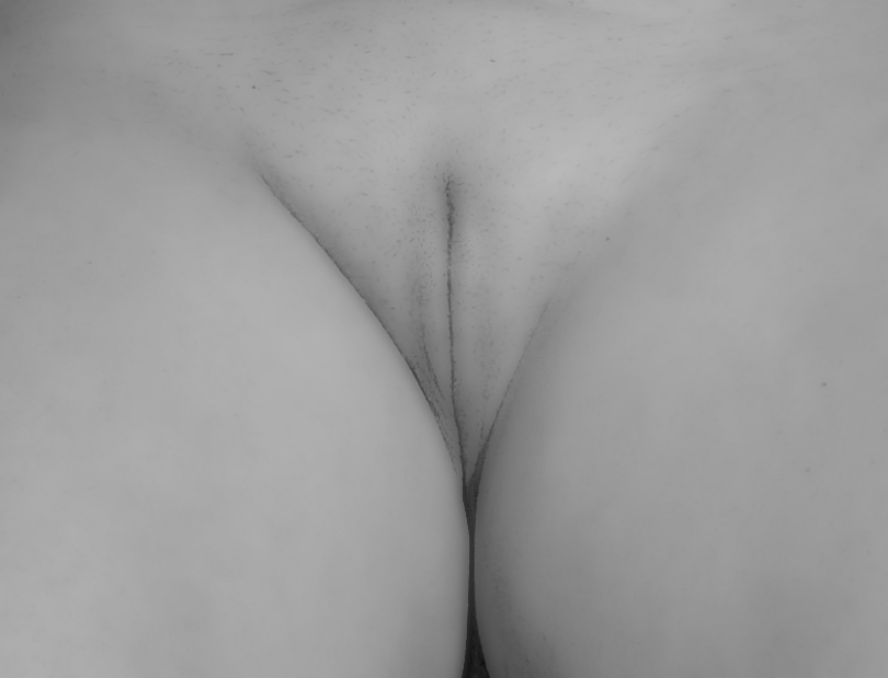 Vulva femenina en blanco y negro, representando la metáfora de la "sonrisa vertical".